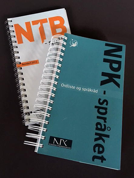 NPK-språket, Nynorsk pressekontors språkbok og NTB-språket, Norsk Telegrambyrås språkbok, fra henholdsvis 2007 og 2012